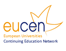 Logo des Netzwerkes der Europäischen Hochschule mit LLL-Angeboten